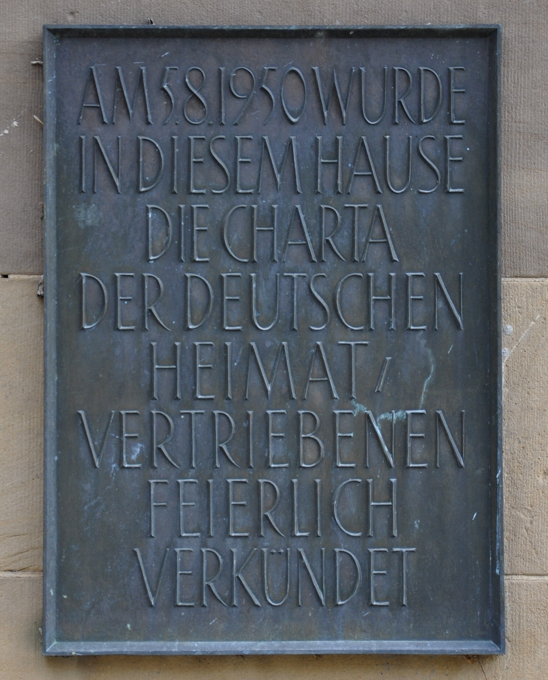 Stuttgart, Bad Cannstatt, Kleiner Kursaal, Gedenktafel Charta der Heimatvertriebenen 1950